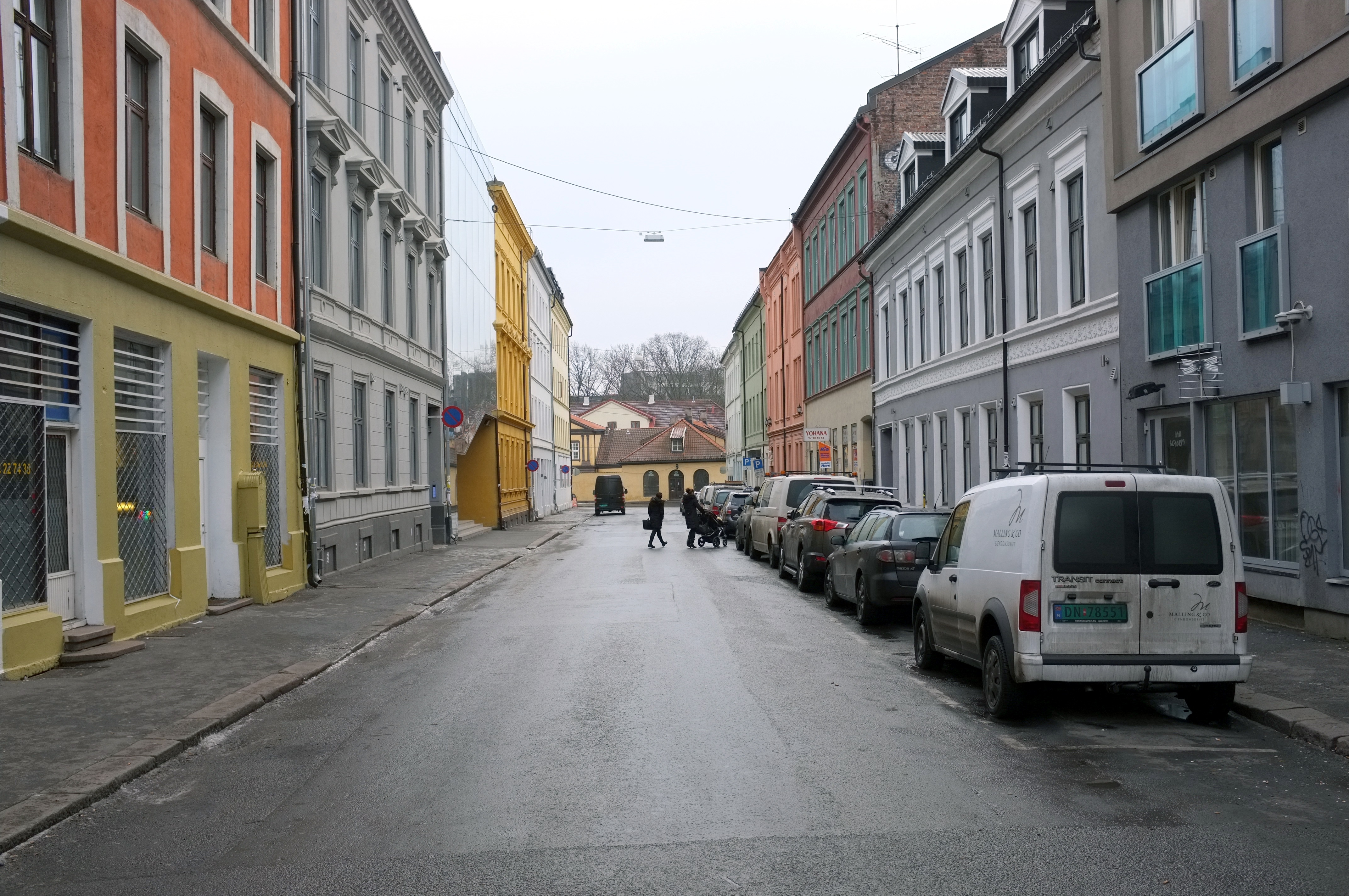 Osterhaus' gate i Oslo.